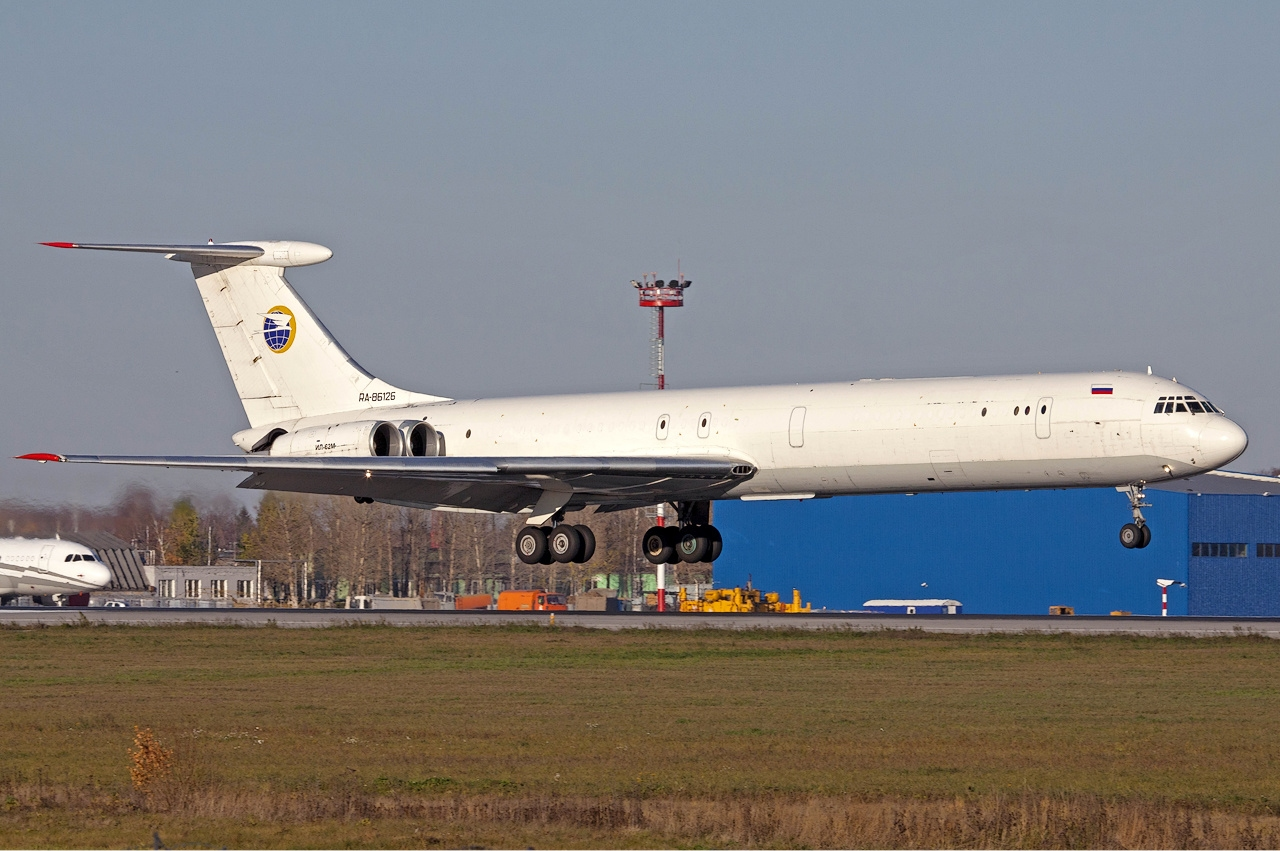 KAPO Ilyushin Il-62M